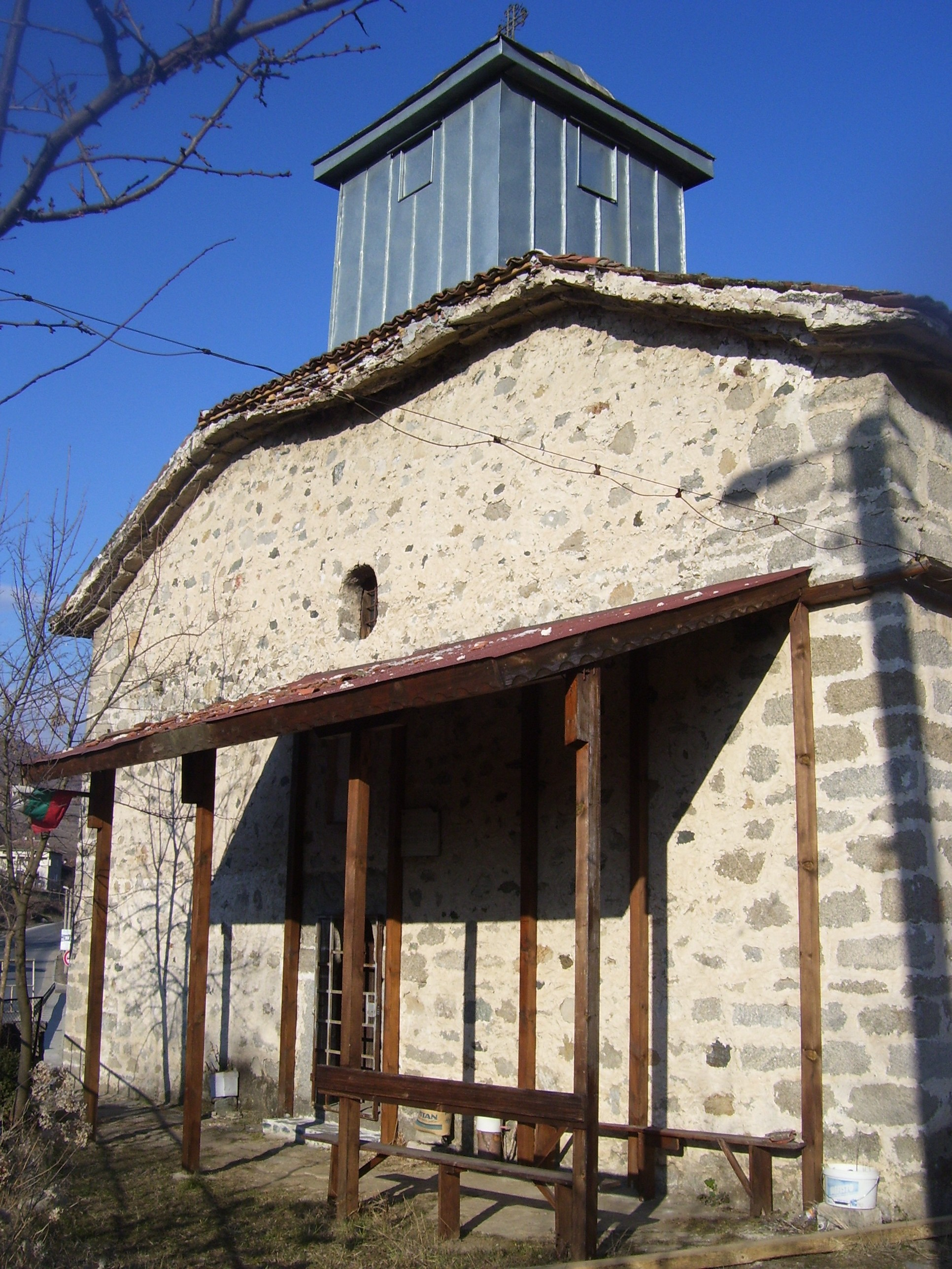 Църквата в село Градево, област Благоевград, България